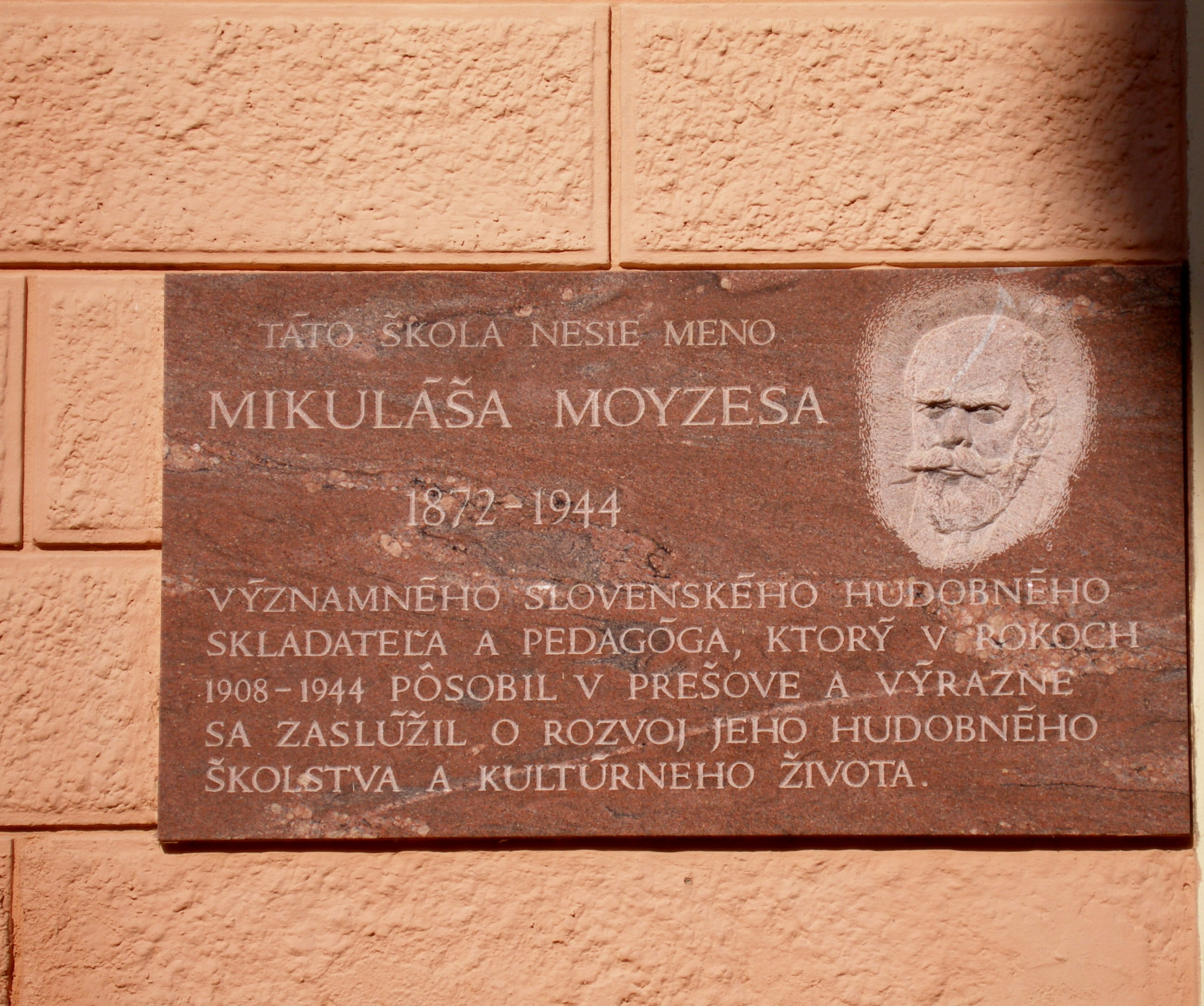 Ulica Baštová v Prešove.